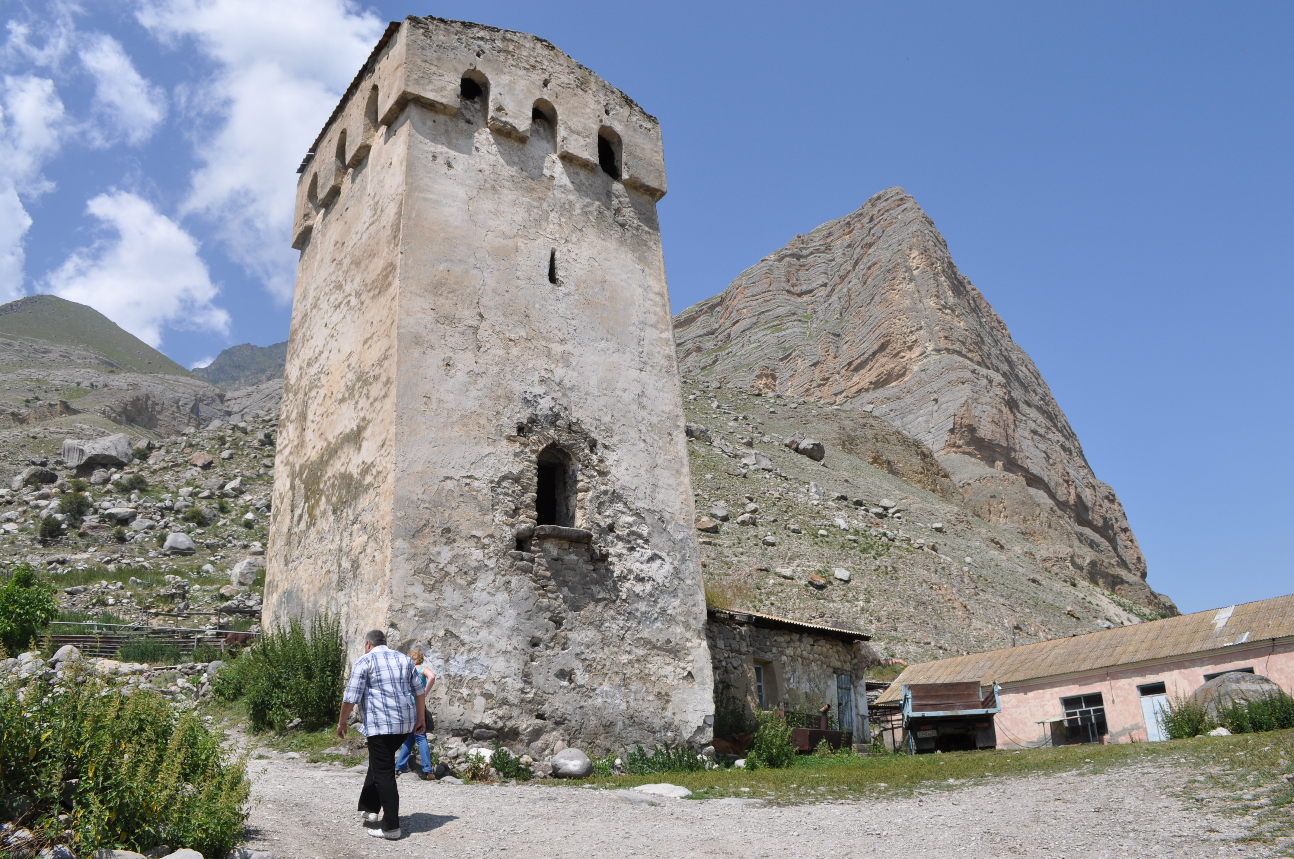 Башня князей Балкаруковых в с.Эльтюбю в верховьях р.Чегем